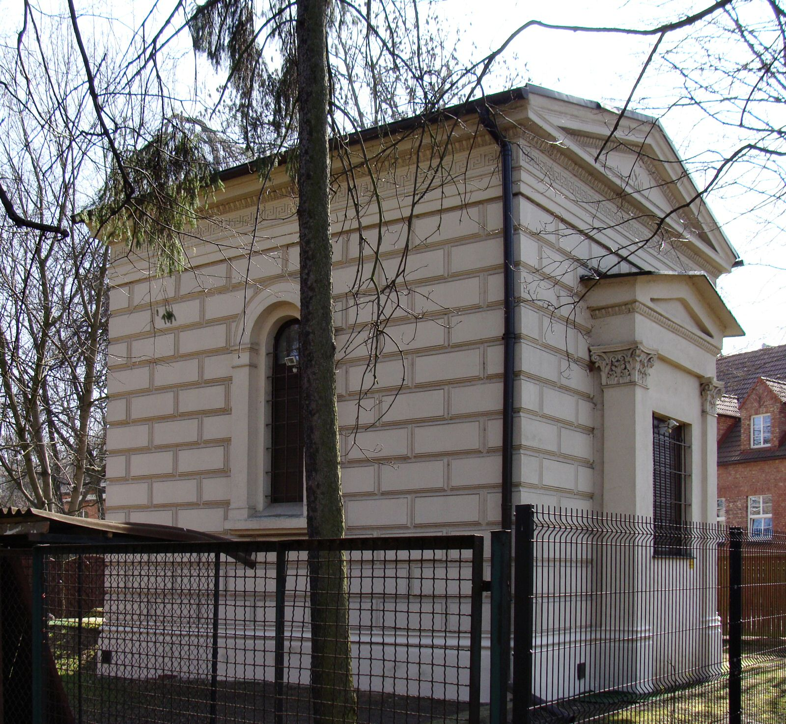 Dawna kaplica cmentarna Zakładu Opiekuńczego Bethanien w Szczecinie